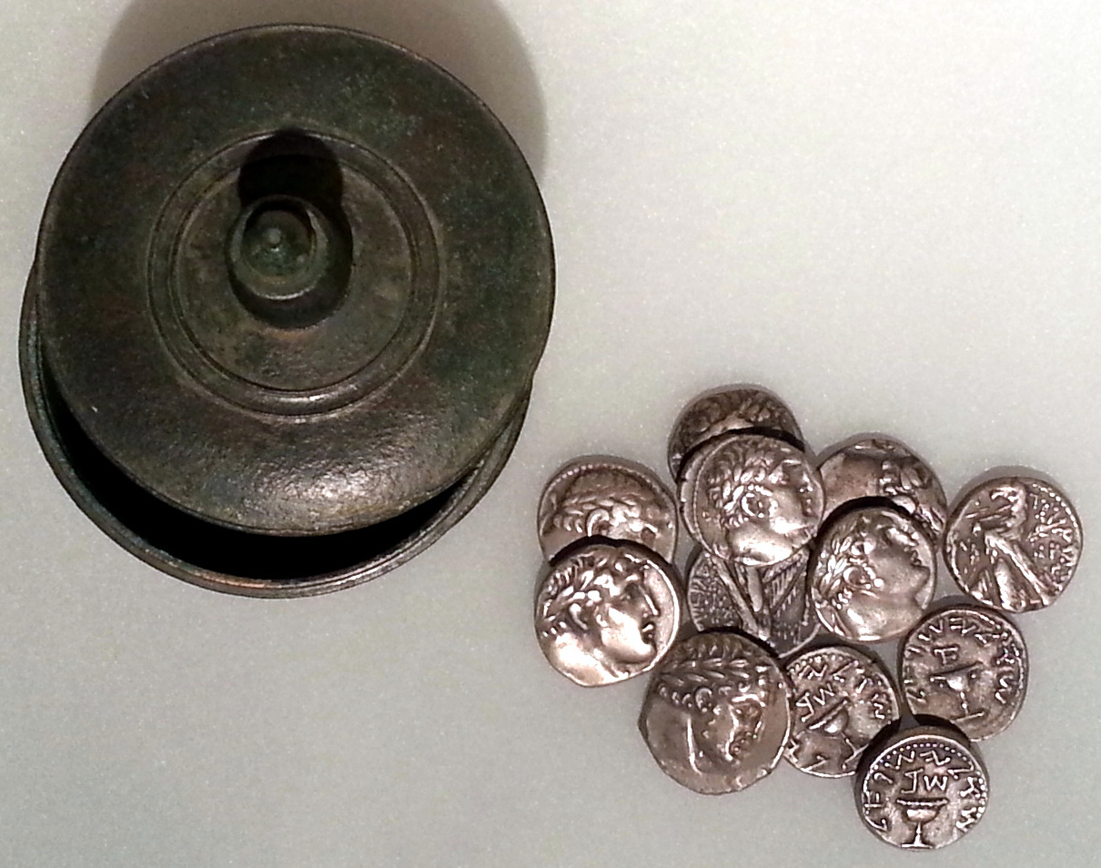 מטבעות שהלכו בארץ ישראל במאות הראשונות לספירה, וכלי אחסון; מוצגים במוזאון ישראל בירושלים